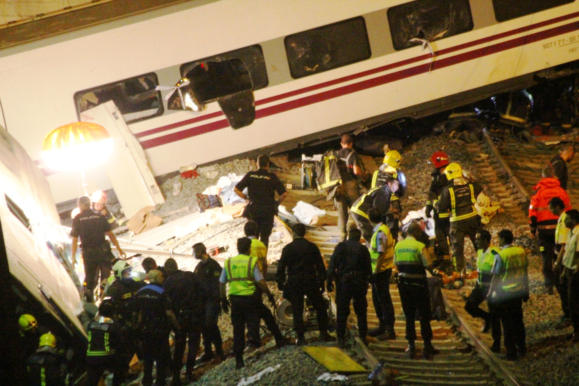 Fotos que hice in situ del accidente ferroviario ocurrido este 24 de julio cerca de Santiago de Compostela. En el momento de escribir estas líneas ya se cuentan 65 muertos. Es el peor accidente ferroviario de España en los últimos 40 años. Tragedy in Santiago de Compostela Photos I made on-site of the train crash on July 24 near Santiago de Compostela. At the time of writing are counted 65 dead. It is the worst rail accident in Spain in the last 40 years.